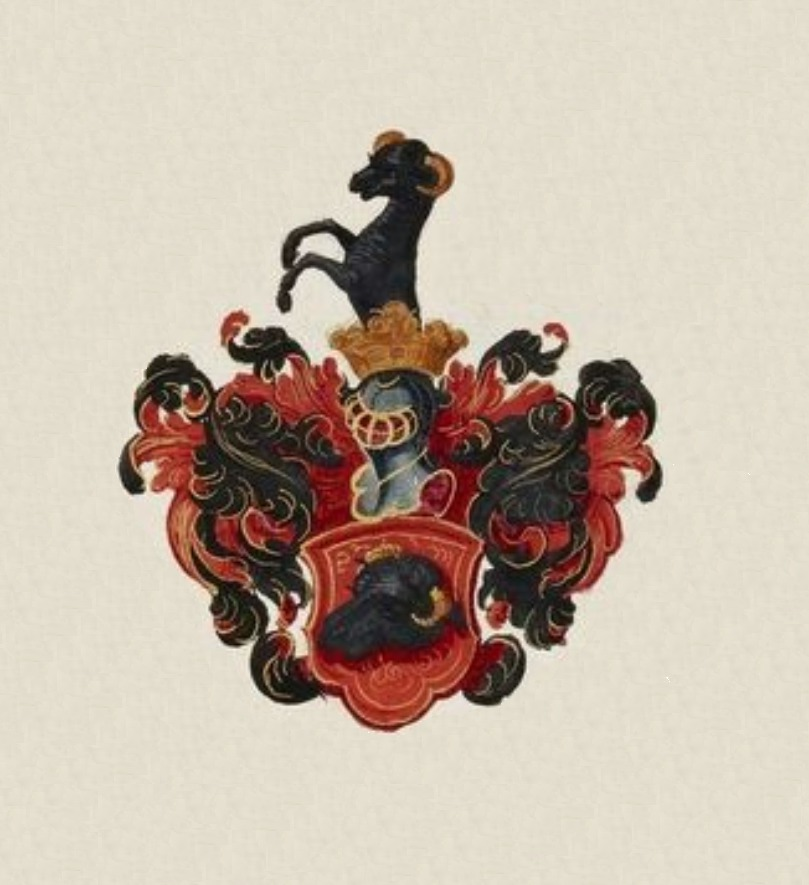 původní erb